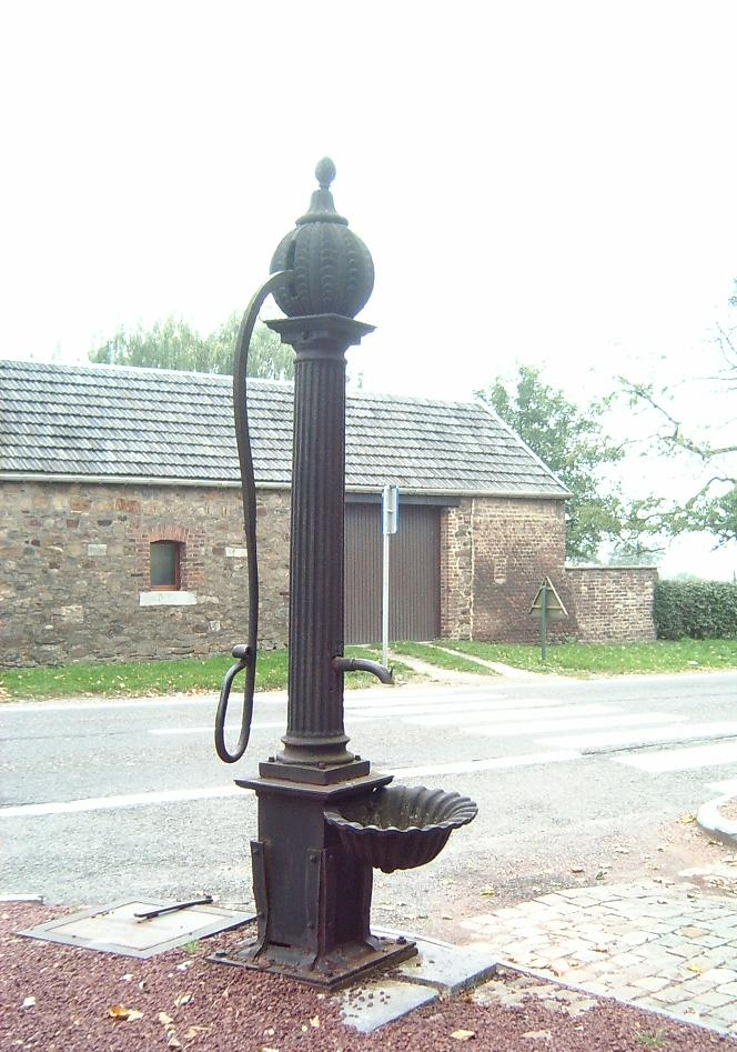 Limburgs: Ouw pómp in Julémont (Belsj)